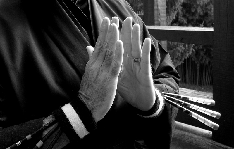 Zen-Dojo-Sarbacana (pratique du Sarbacana) Katasarbacana: "Jointif par le vide" Fondateur: Michel-Laurent Dioptaz